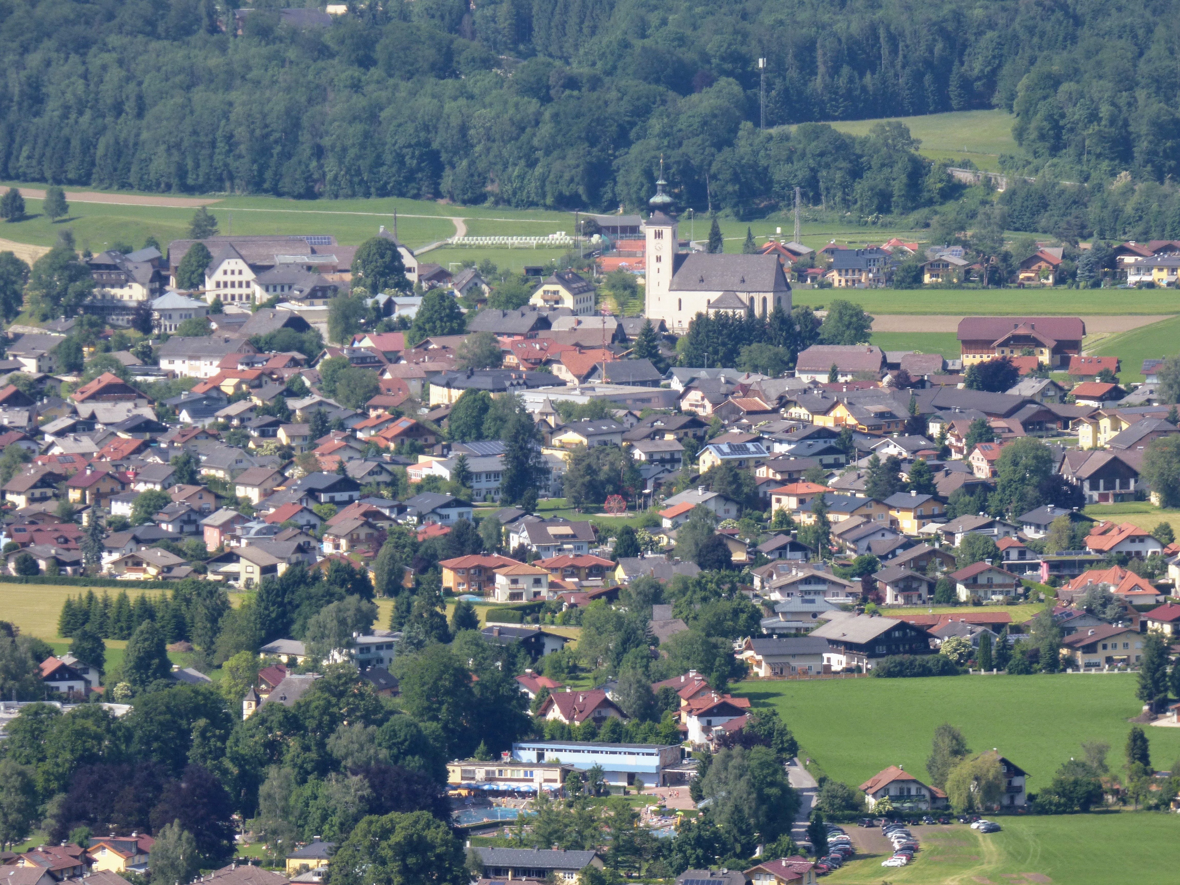 Blick von Dürrnberg (Hallein) auf Oberalm